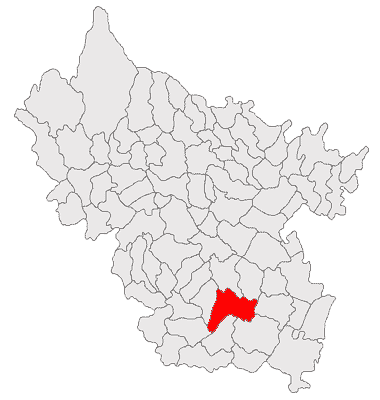 Categorie:Hărţi ale judeţului Buzău